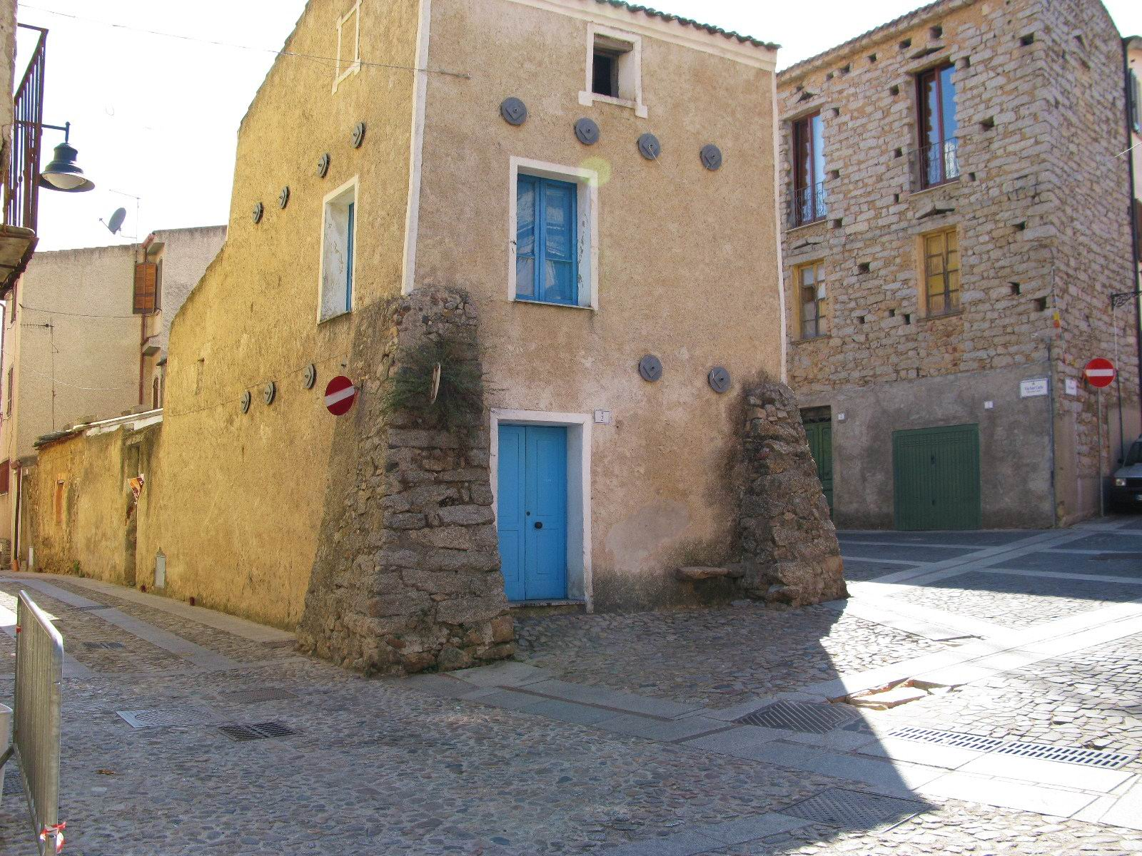 Casa delle contrafforti